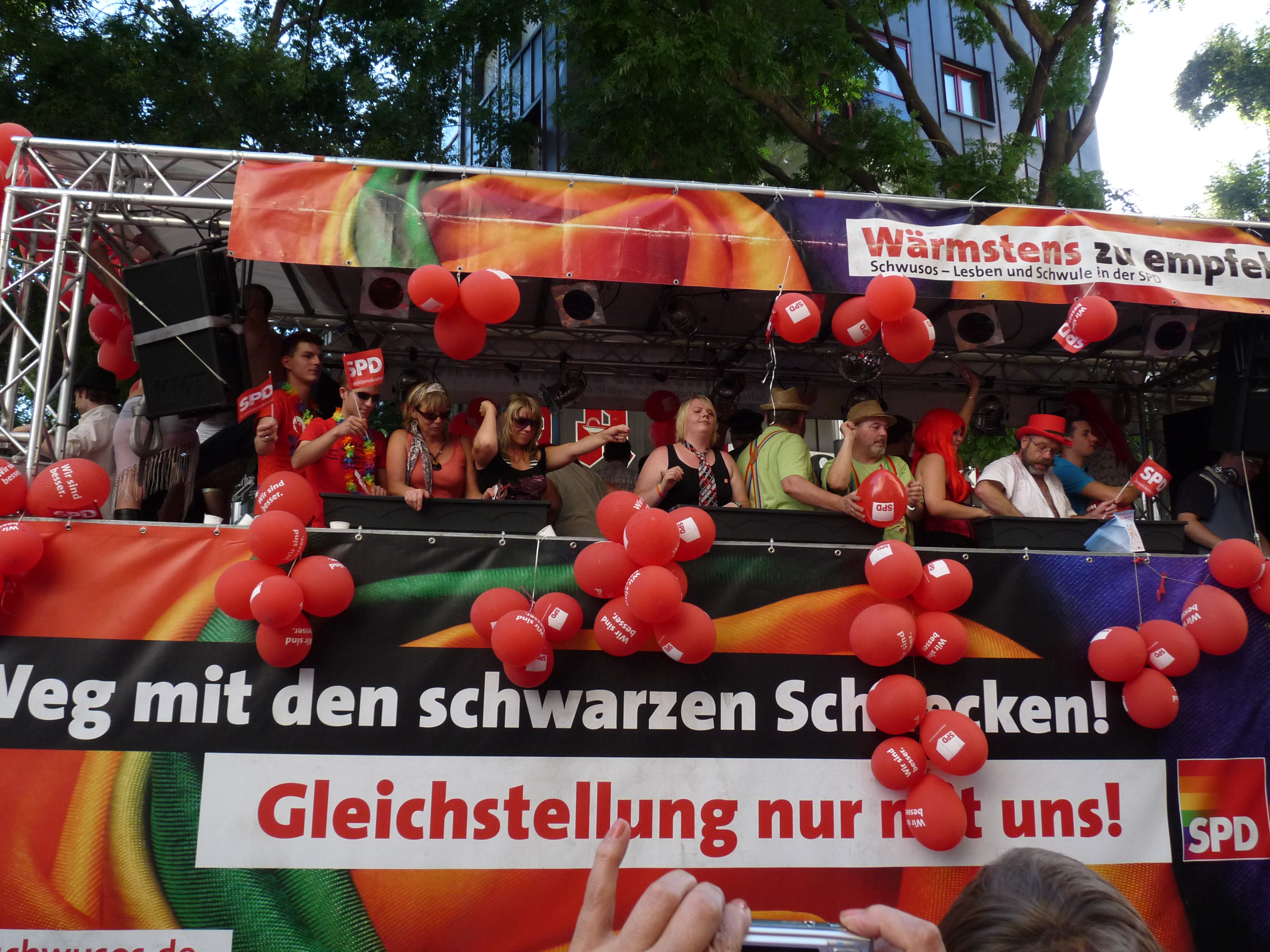 Stuttgart - CSD 2009 - Parade - Schwusos